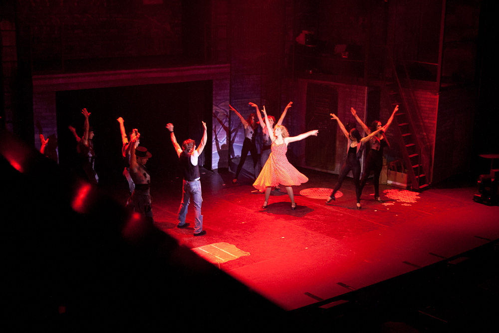 Musical "Hoy no me puedo levantar" en la gira celebrada en el teatro Villamarta de Jerez de la Frontera.